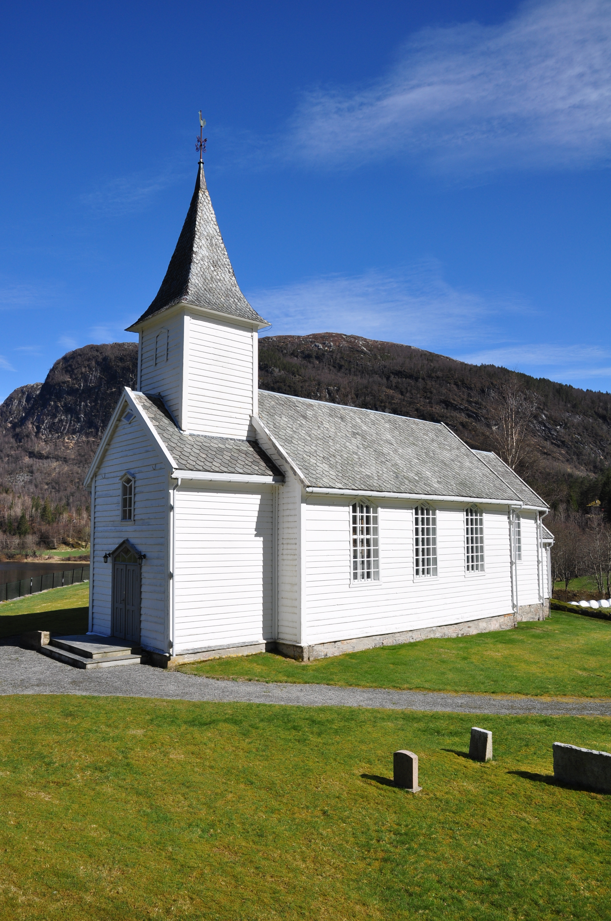 Guddal kyrkje står i Guddal søraust i Fjaler kommune i Sogn og Fjordane, og er ei langkyrkje som plar daterast til 1870, sjølv om delar av kyrkja er frå 1686. I 1870 vart den gamle kyrkja utvida, og samstundes fekk heile bygget ny kleding og det vart lagd nytt golv og panel inne. Kyrkja fekk òg eit tårn. 25. september 1870 vart kyrkja vigsla på nytt. Til jubileet i 1970 vart kyrkja pussa opp igjen. I mellomalderen stod det ei stavkyrkje i Guddal, denne vart truleg riven på 1600-talet. Guddal kyrkje høyrer til Fjaler sokn i Sunnfjord prosti. Guddal var tidlegare eit eige kyrkjesokn, men sokna i det tidlegare prestegjeldet er no ihopslegne til eitt sokn. (Kjelde: Nynorsk Wikipedia)